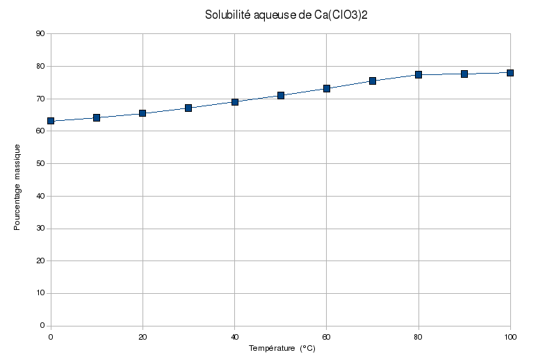 Solubilité aqueuse du chlorate de calcium